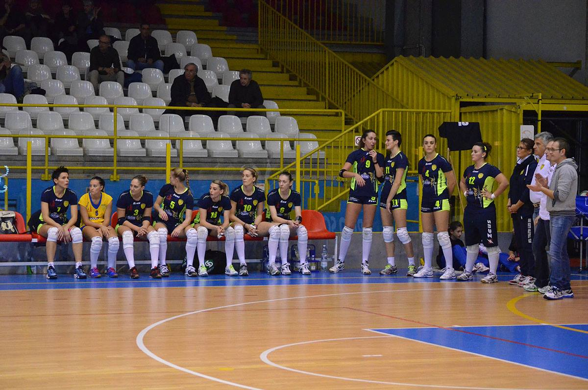 Stagione 2013-14